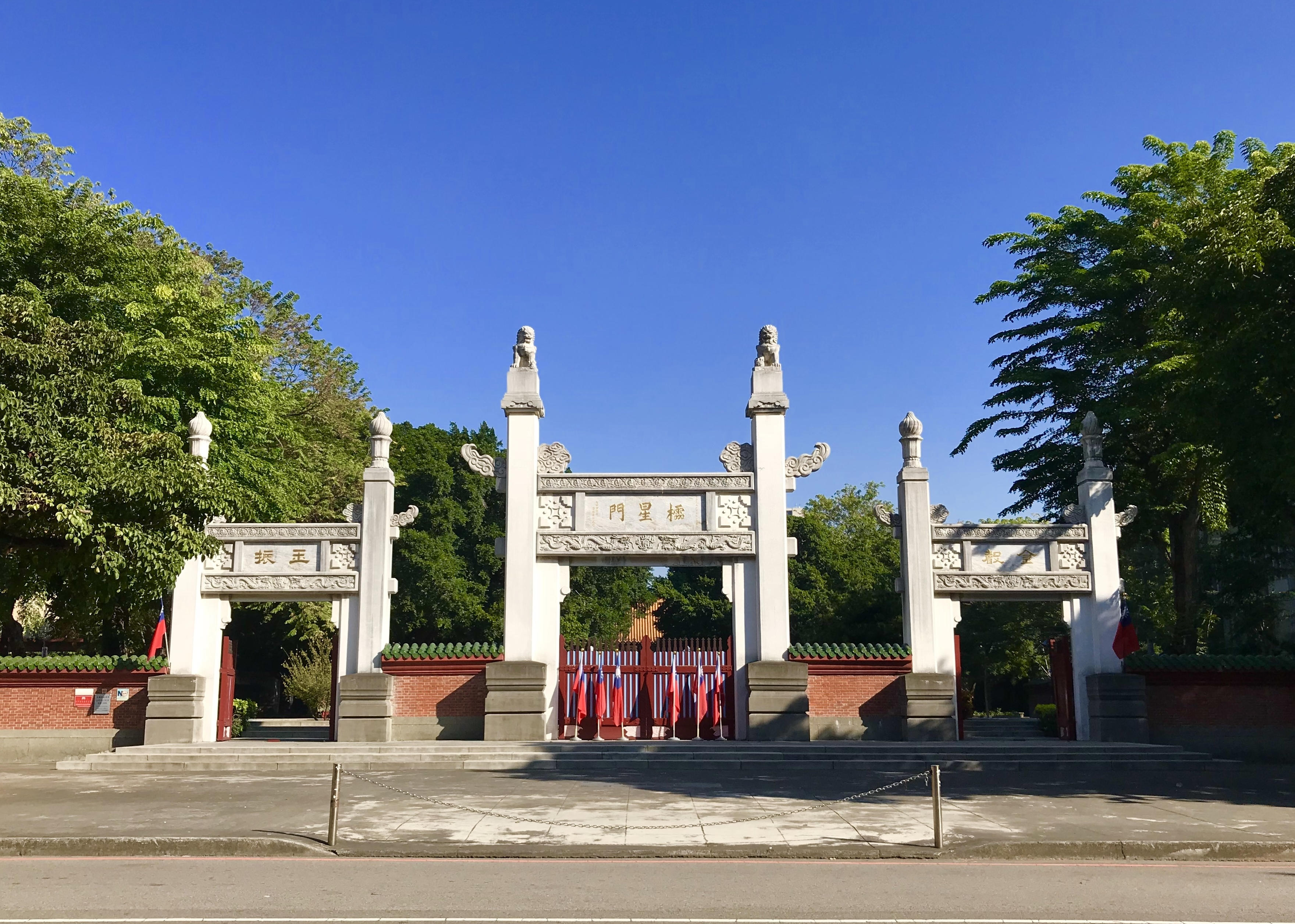 臺中孔子廟櫺星門